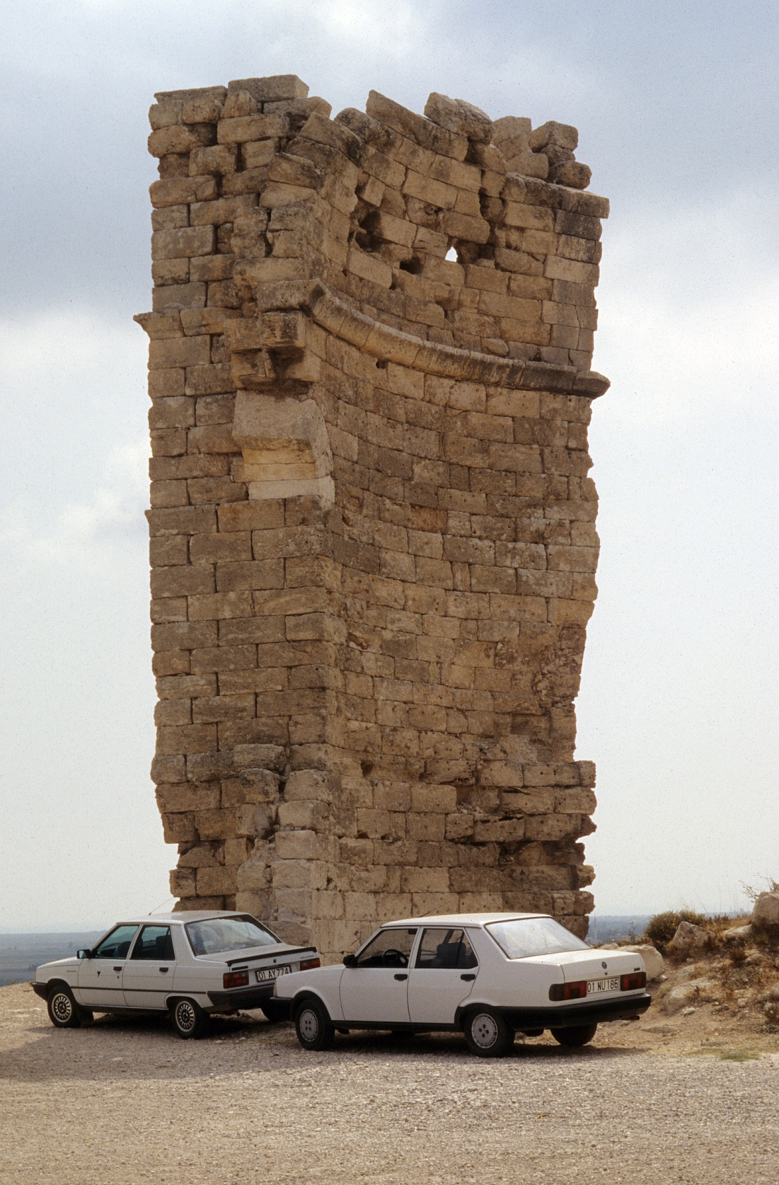 Ayathekla, Pilgerstätte der Hl. Thekla in Silifke, Südtürkei, Rest der Basilika